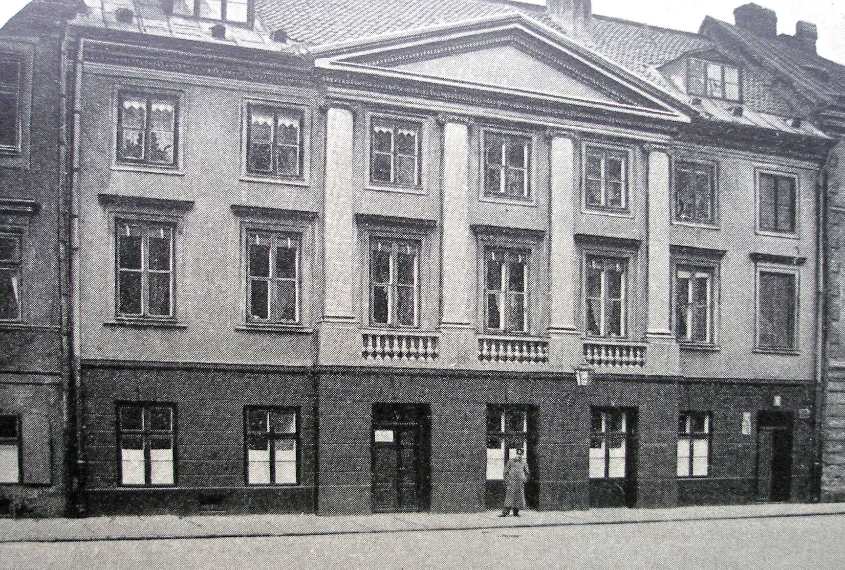 Building of the Warsaw Royal Society of Friends of Learning, siedziba Warszawskiego Królewskiego Towarzystwa Przyjaciół Nauk (1807-1823)